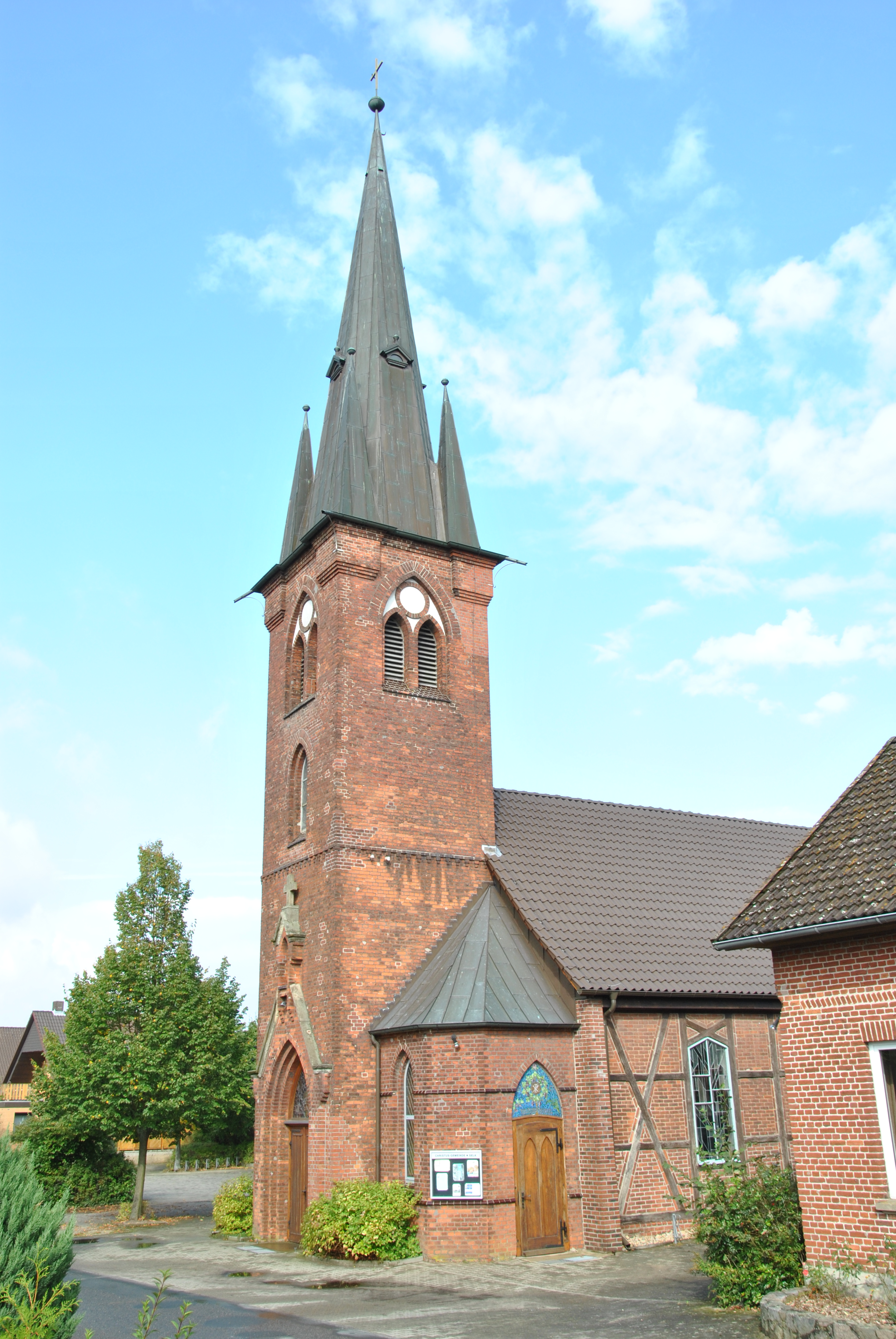 Der Kirchenturm mit dem Kirchenschiff. Rechts sieht man ein Teil des Pfarrerhauses.